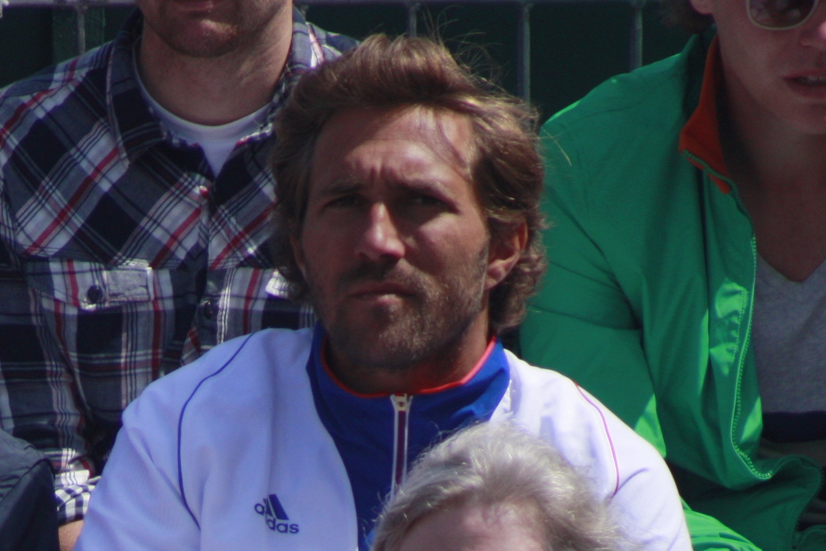 Arnaud Di Pasquale aux JO de Londres 2012, regardant le match Gasquet/Haase.